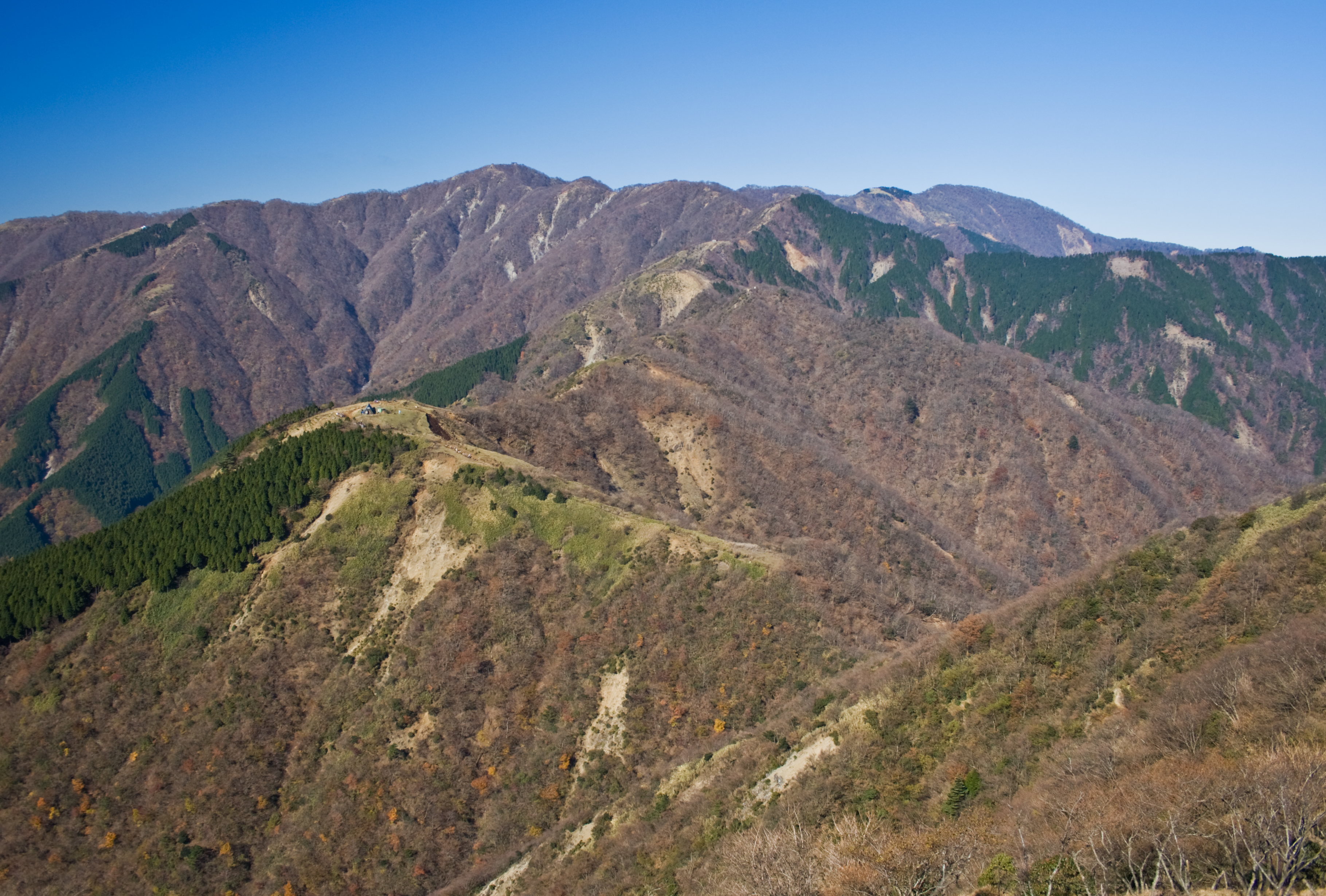 三ノ塔より望む塔ノ岳